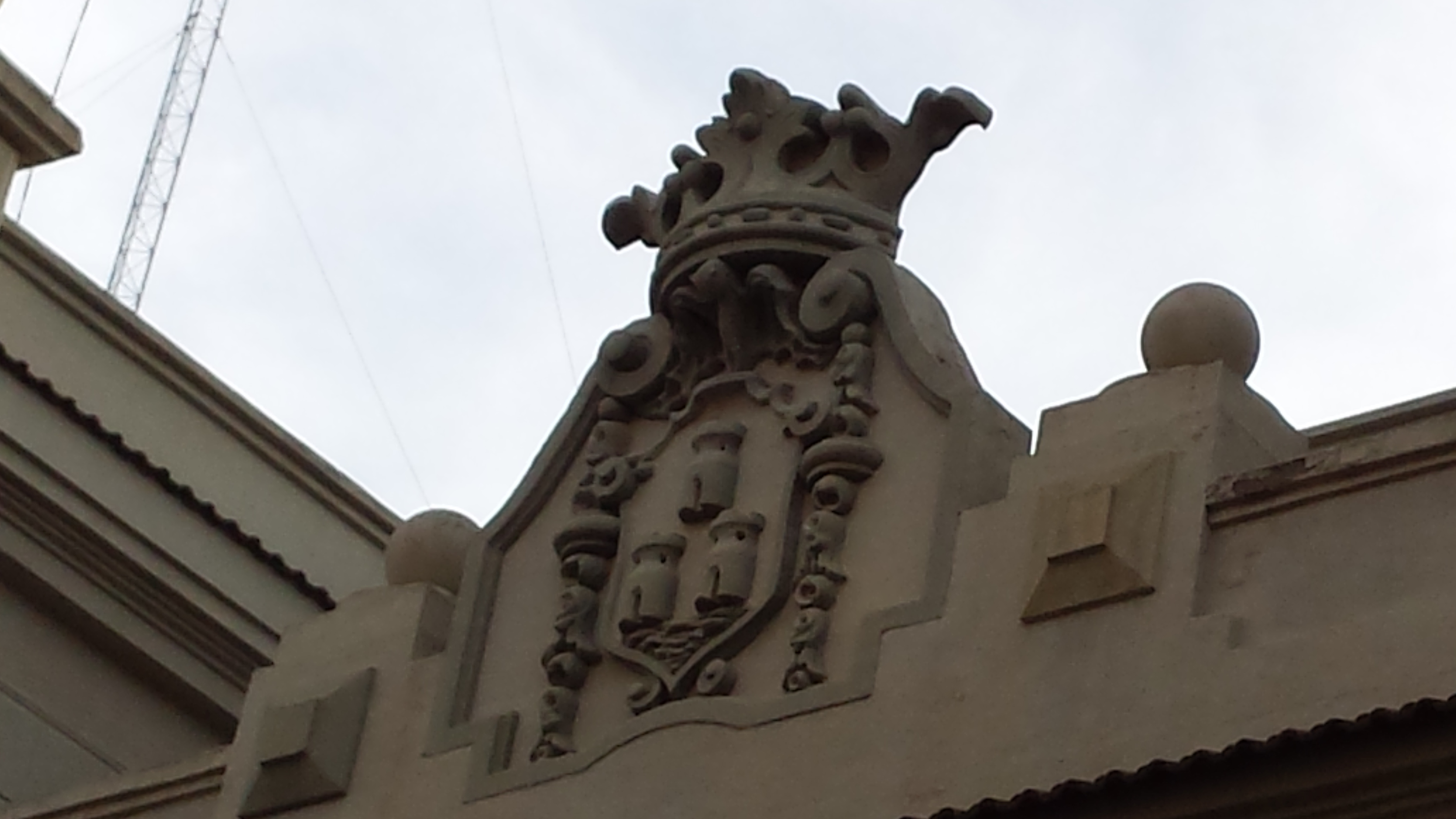 Escudo de Albacete situado en el palacio que alberga la sede de los Servicios Periféricos de la Consejería de Sanidad y Asuntos Sociales en Albacete